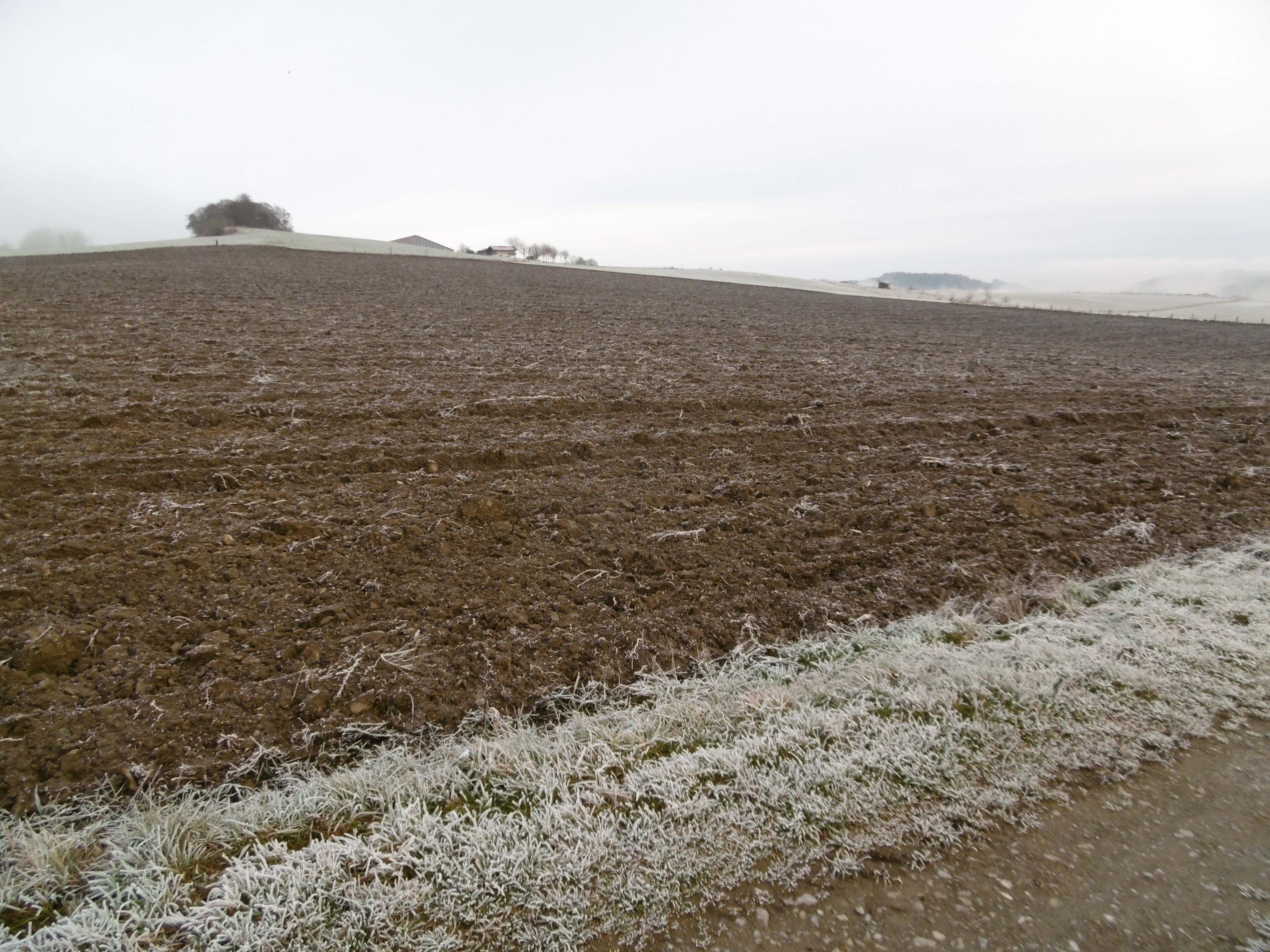 Landschaftsschutzgebiet Freiflächen Thülener Bruch / Schwarzes Haupt / Rösenbeck​ mit Blickrichtung nach Osten auf Bereich mit großen Kuhstall westlich Rösenbeck.